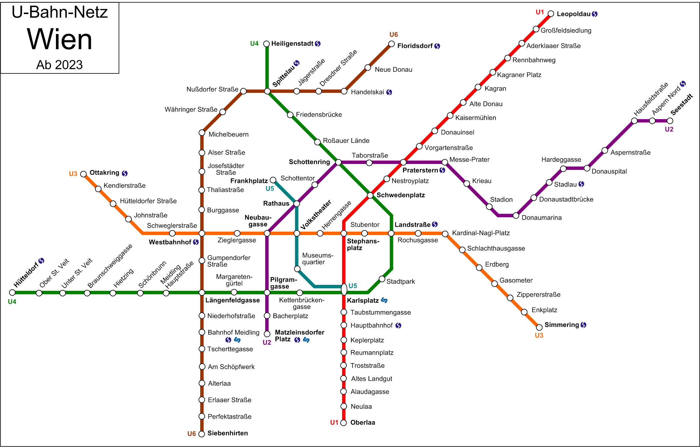 Netzplan Wiener U-Bahn 2023